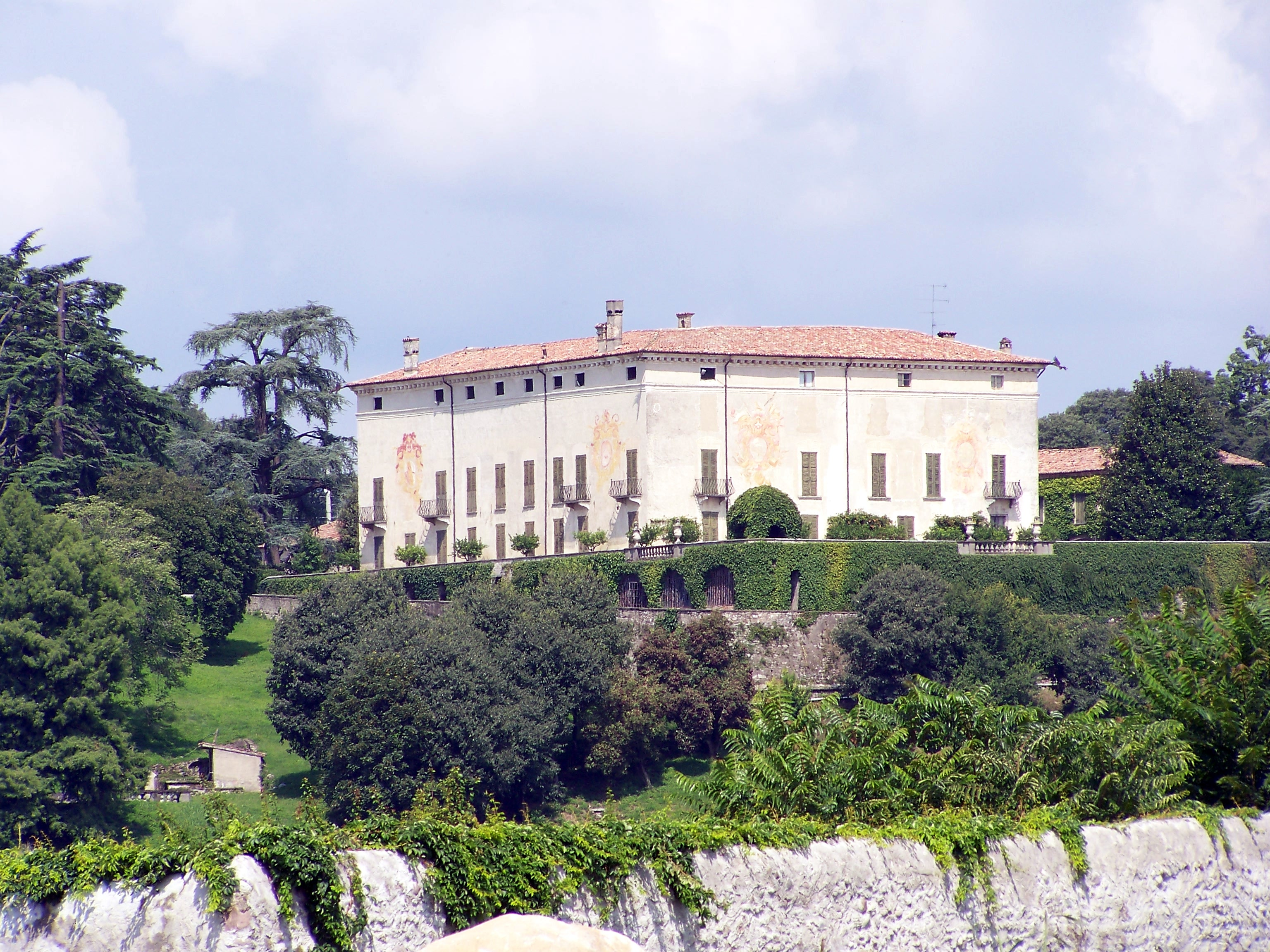 Villa Maggi vista dai piedi della collina di Calino.